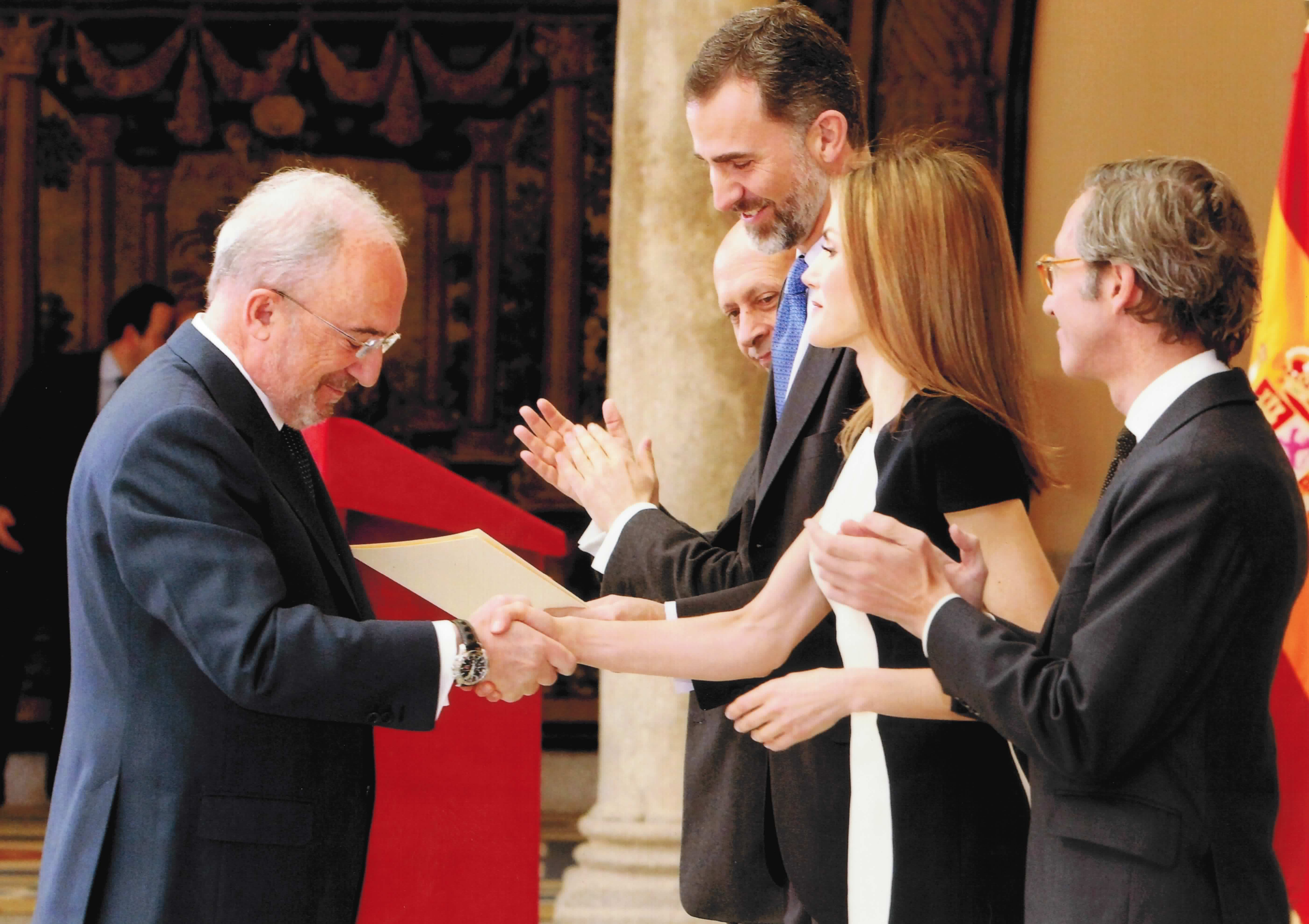 Sus Majestades los Reyes de España entregan el Premio Nacional de Ensayo 2013 a Santiago Muñoz Machado